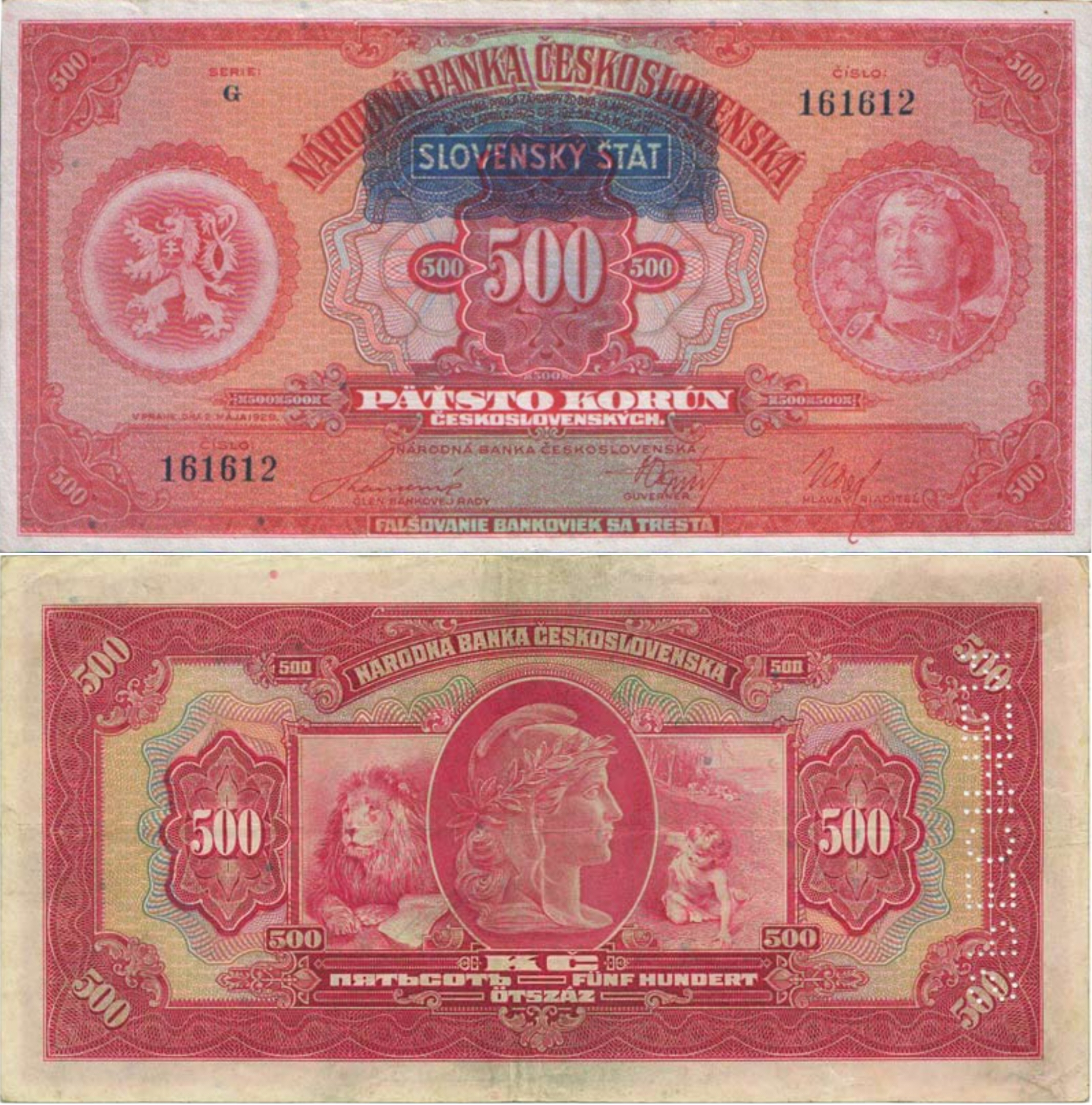 Czech. 500 Korun-Note mit Überstempelung „Slowak. Staat“ April 1939.